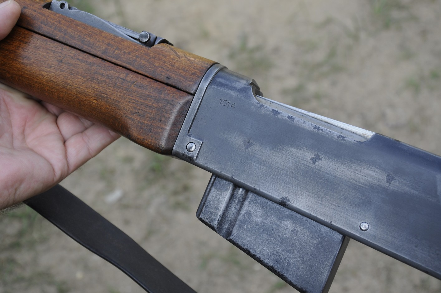 Niedawno trafił do Polski karabinek wz 38m o numerze 1014. Broń jest w pełni sprawna srzelająca. Broń można obejrzeć u prywatnego kolekcjonera z Lubawy